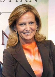 Isabel San Sebastián en la presentación de su libro 'Un reino lejano'.